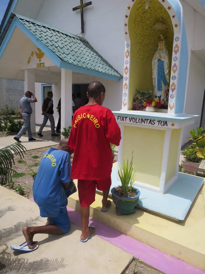 Betende Gefangene vor dem Marienschrein an der Kapelle vom Gefängnis von Becora, Osttimor